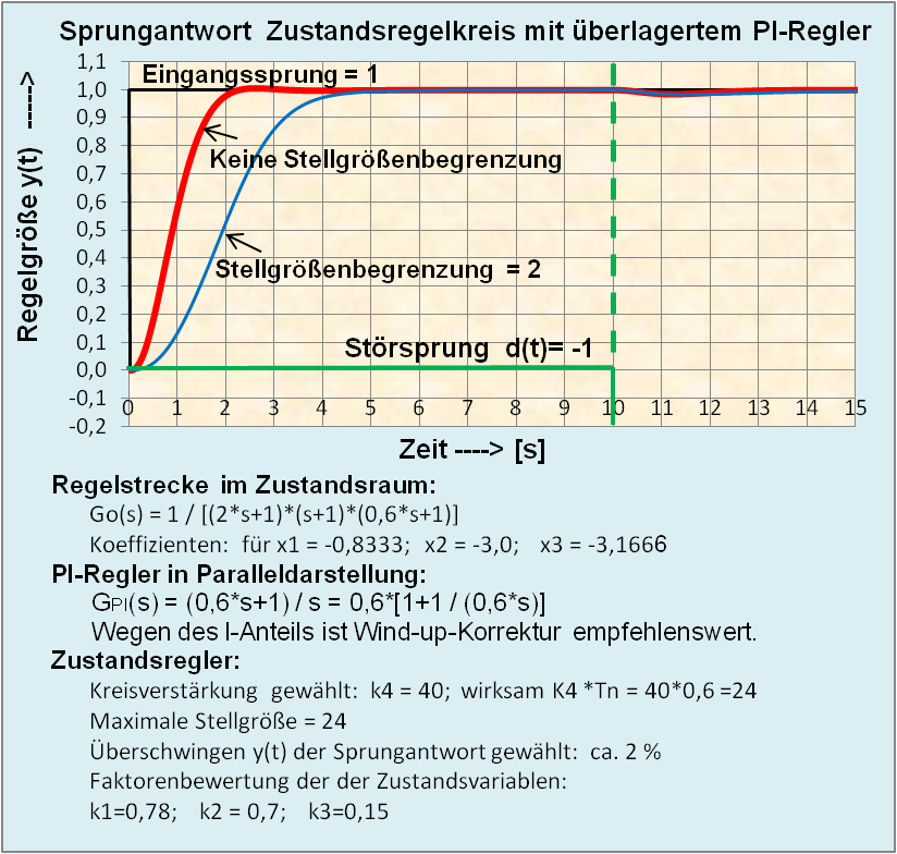 Sprungantwort eines Zustandsregelkreises mit überlagertem PI-Regler